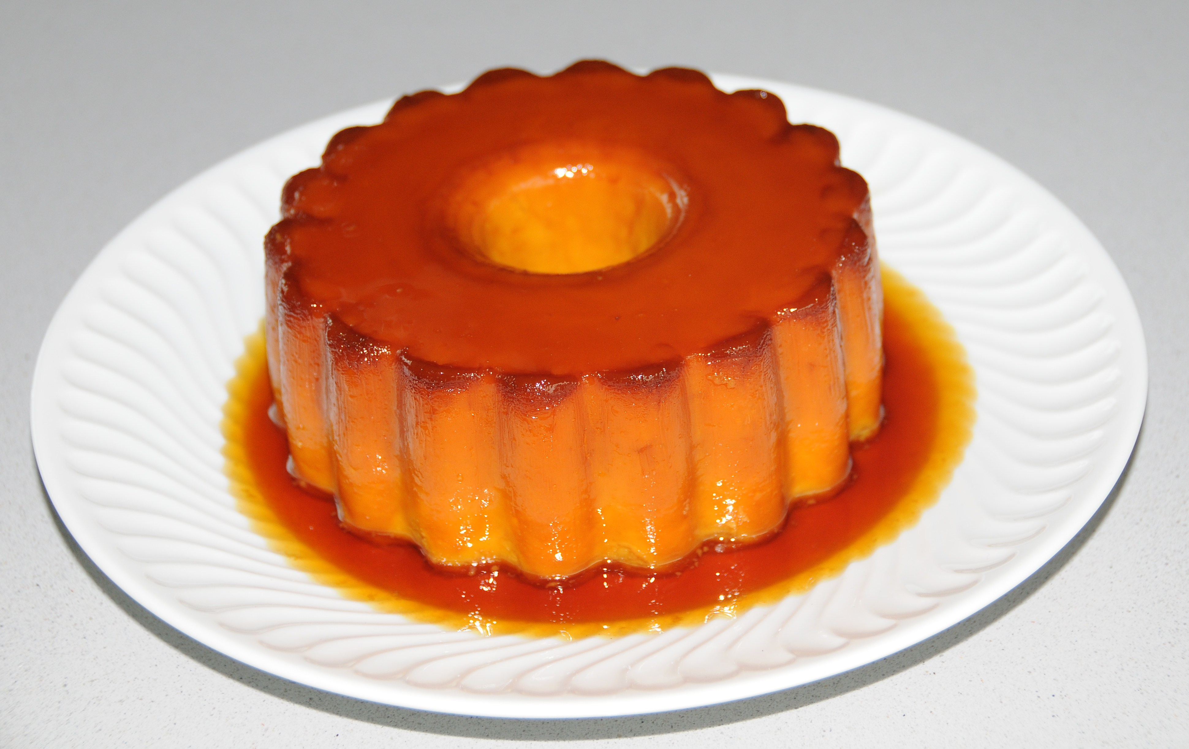 Pudim Abade de Priscos. Confecção caseira.